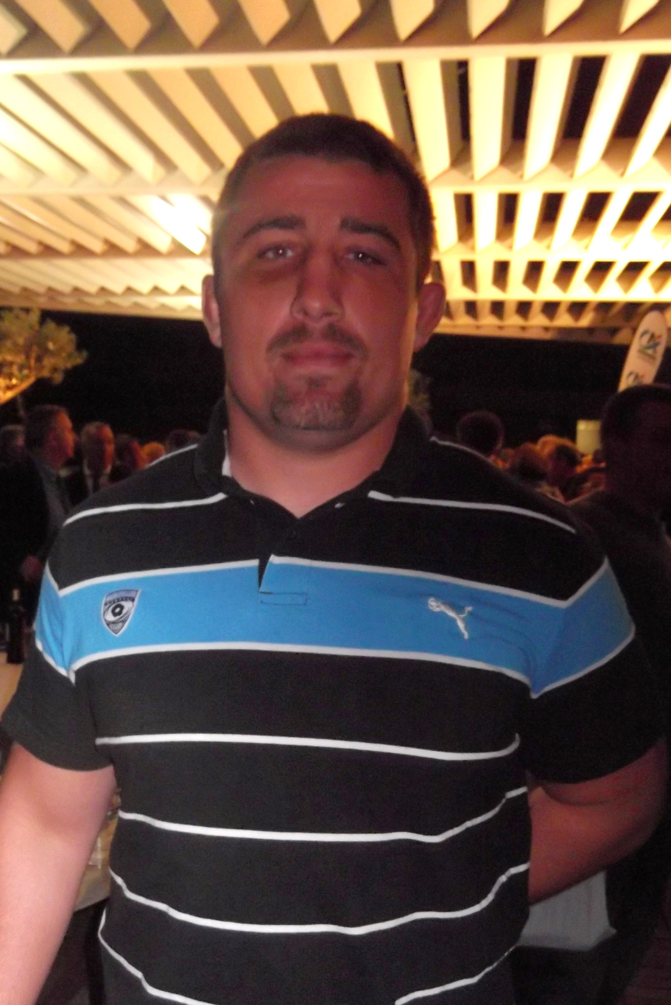 Mickaël Ivaldi, octobre 2013.